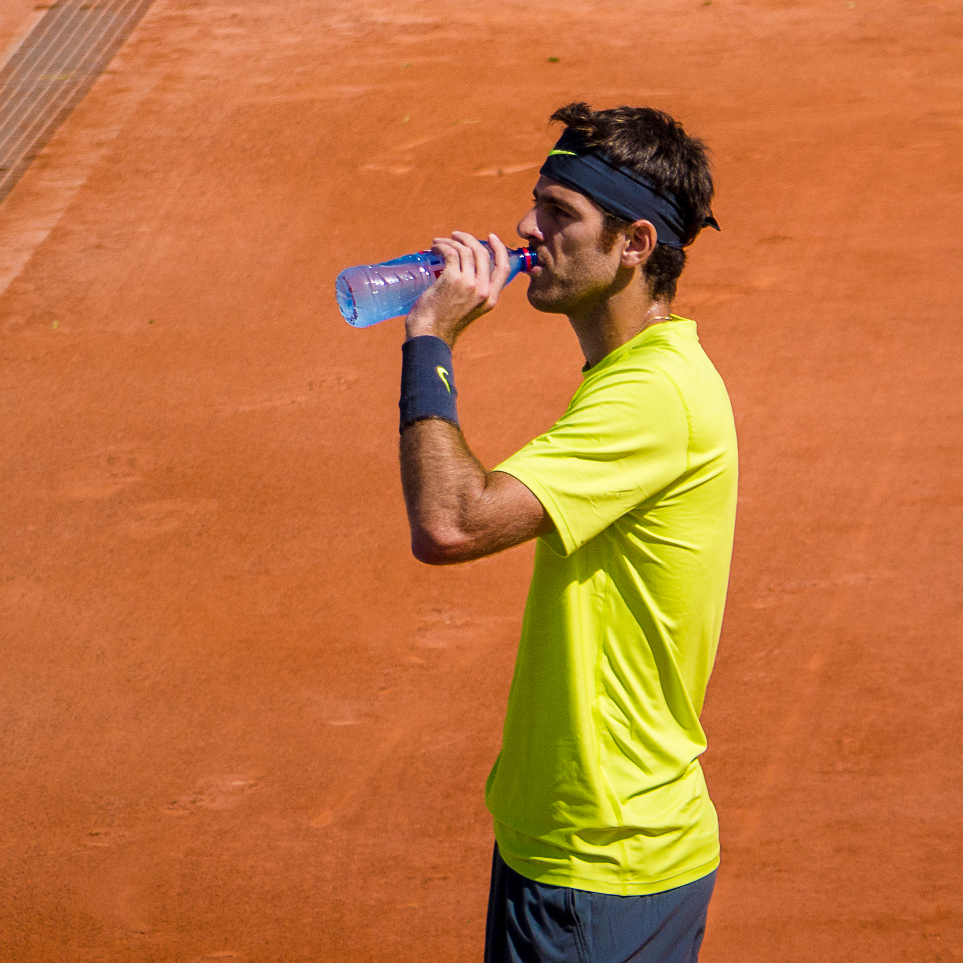 2ème tour Roland Garros 2012 : Juan Martin Del Potro (ARG) def. Edouard Roger-Vasselin (FRA)